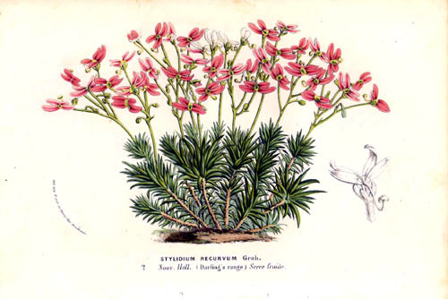 Botanical print of Stylidium bulbiferum (synonym: S. recurvum) (circus triggerplant) from Flore des serres et des jardins de l’Europe (1855, volume 10, plate 999) by Charles Lemaire.